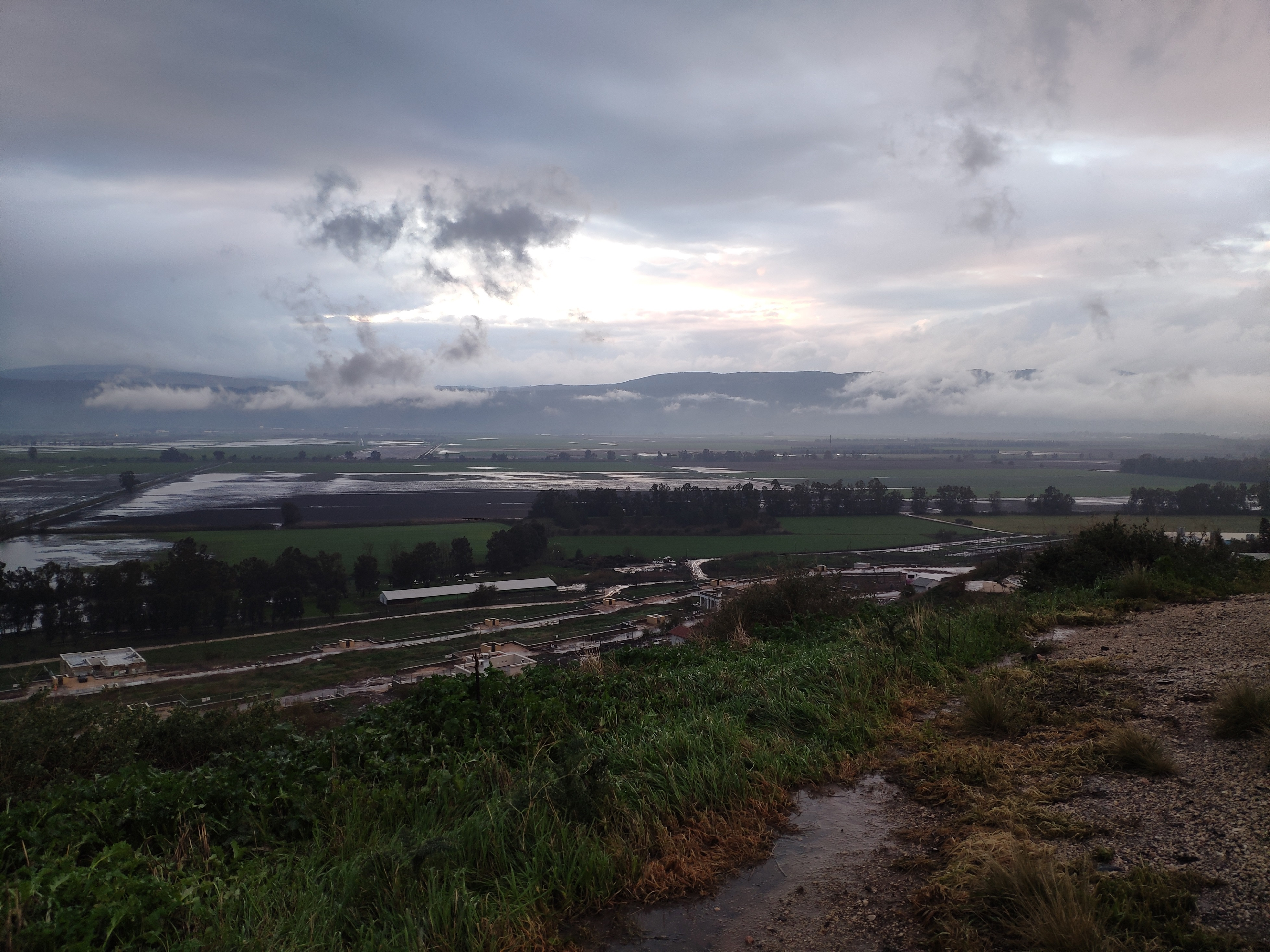 שדות מוצפים בעמק החולה. ברקע הרי נפתלי. ינואר 2020